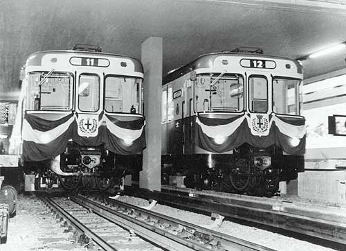 Inauguración de trenes en el metro de Milán (1964)